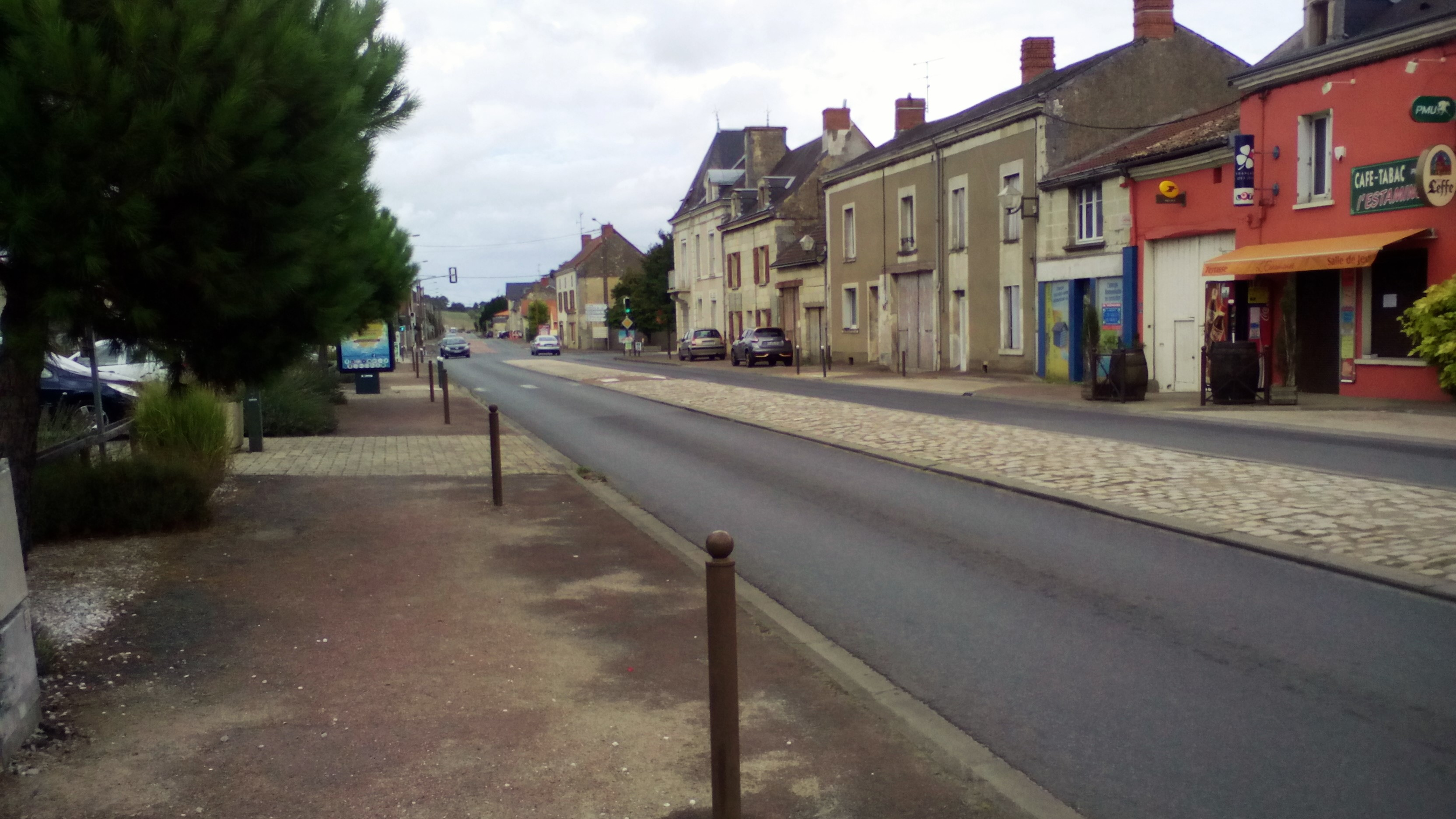 Le village de la Tricherie au bord de la RN10 sur la commune de Beaumont-Saint-Cyr